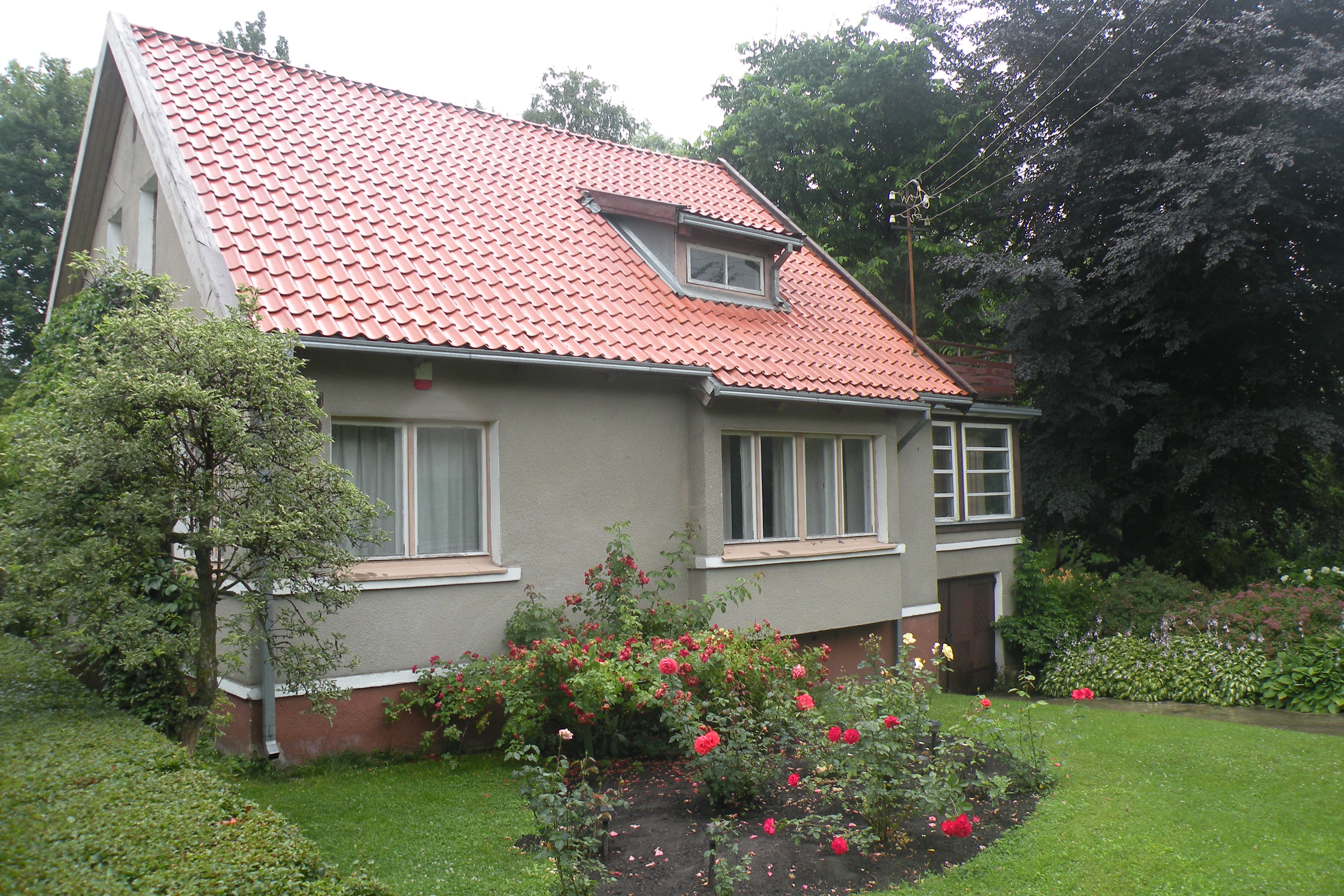 Ievos Simonaitytės memorialinis muziejus.